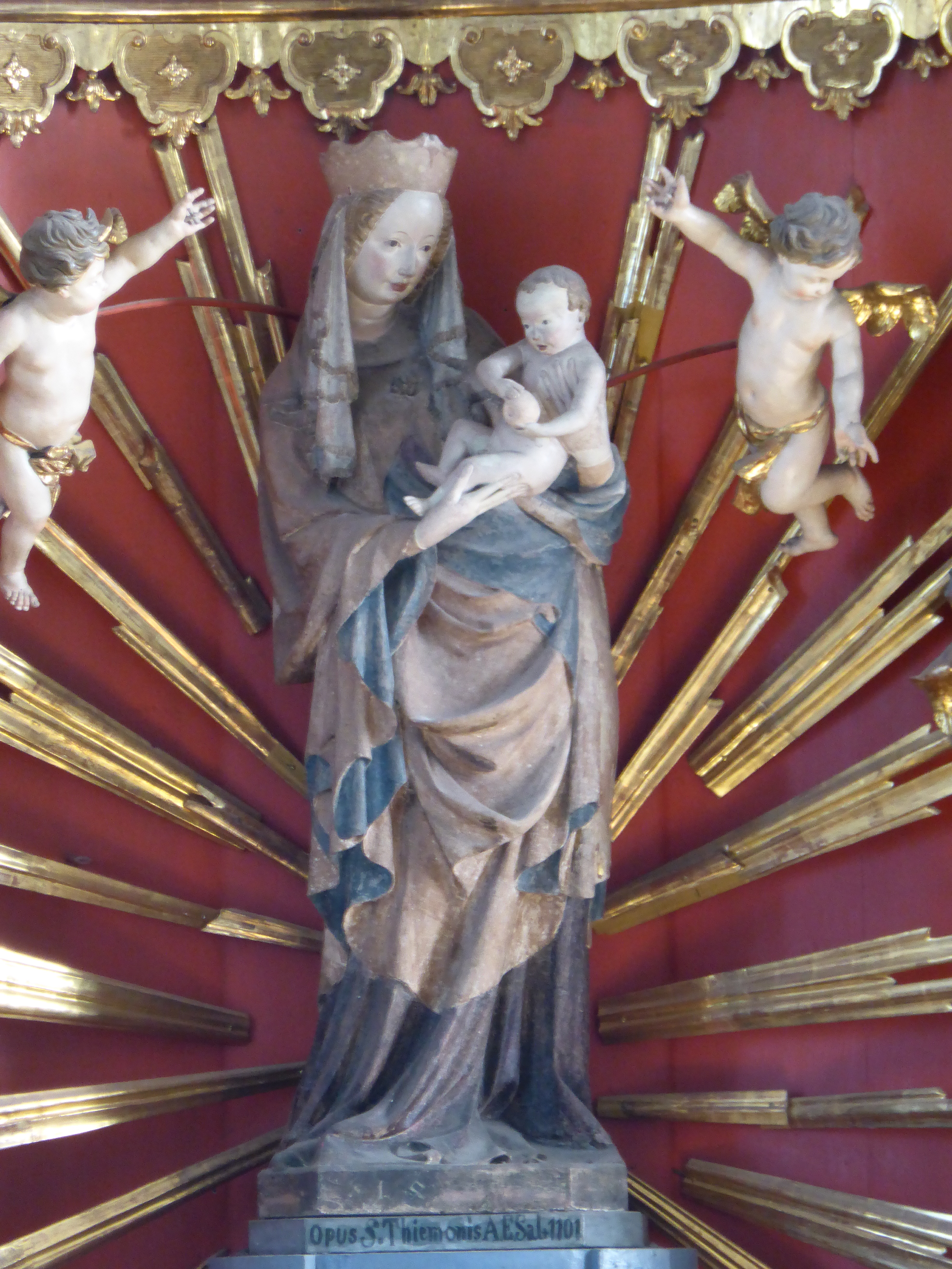 Primärer Kultgegenstand: Salzburger Steingussmadonna aus der Zeit um 1400 in den damals gebräuchlichen Farben Weiß, Blau, Rot nebst Gold.